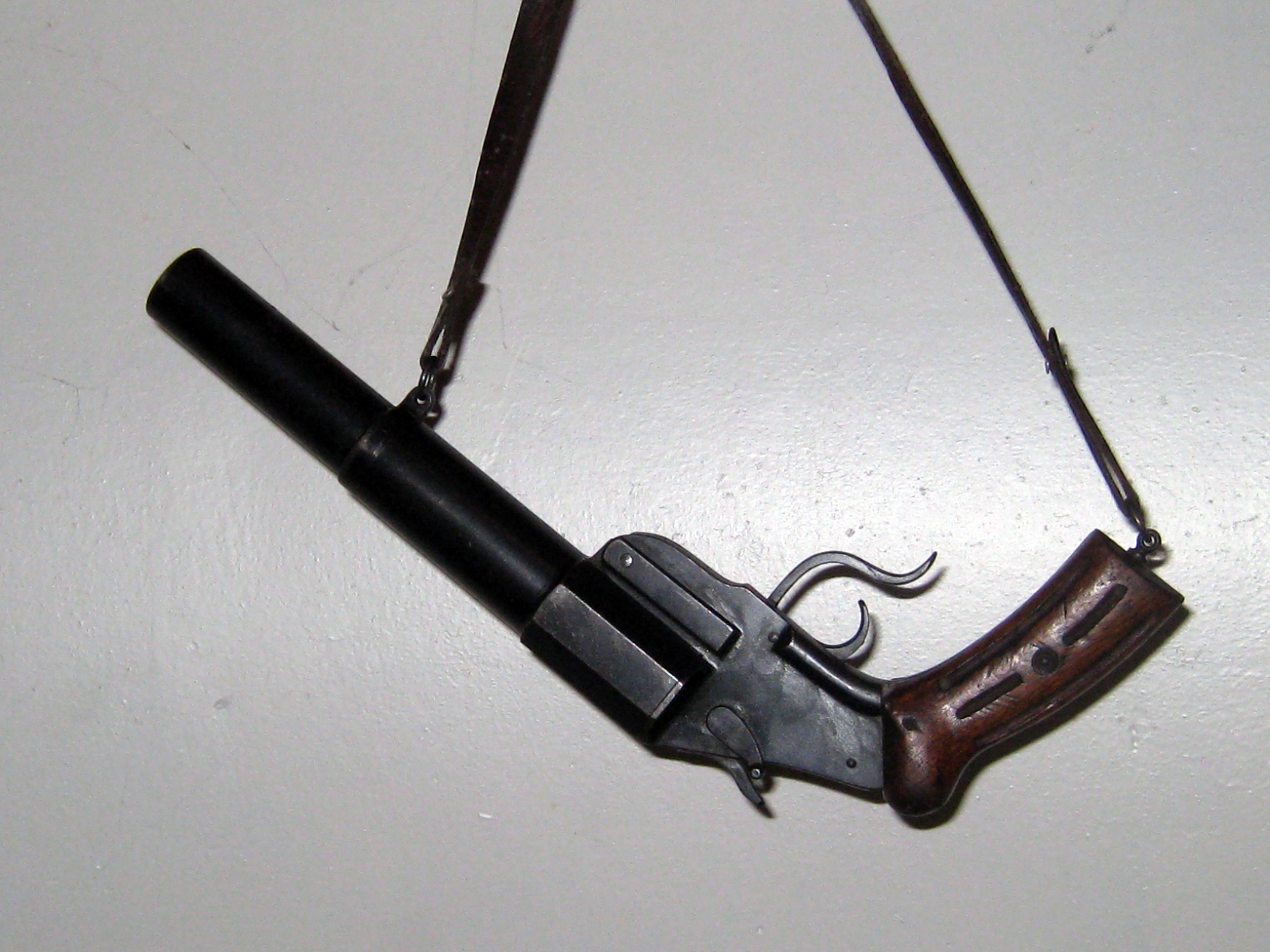 Aufnahme in der Anlage A 4247 Bernau ("Strahler"), Leibstadt